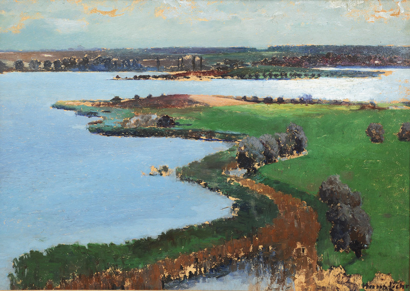 Der Feldberger Haussee in Mecklenburg. Öl auf Karton, 48 x 65,5 cm, signiert, auf dem Rückseitenschutz betitelt